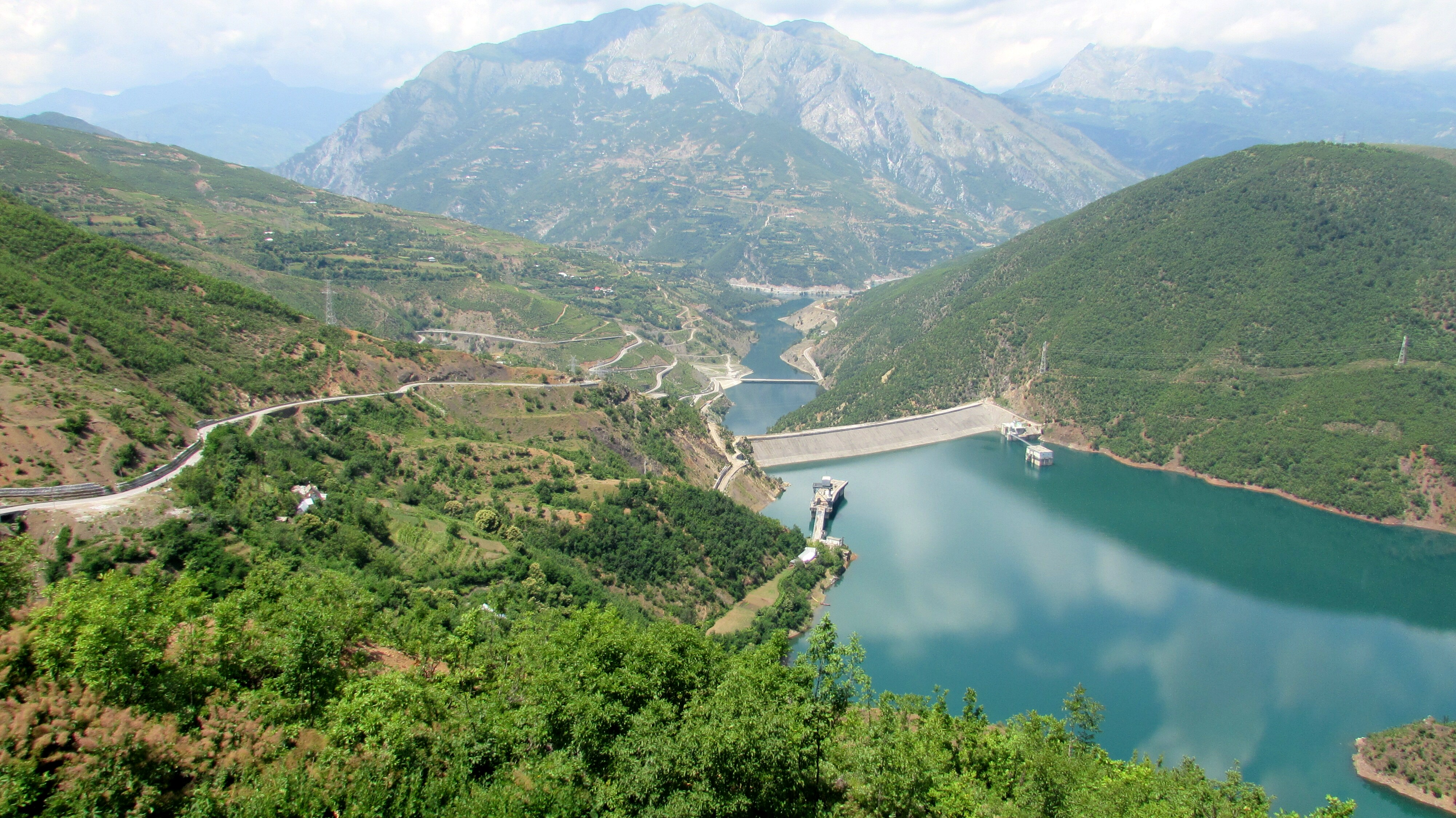 StauseeBeiFierze2014-2